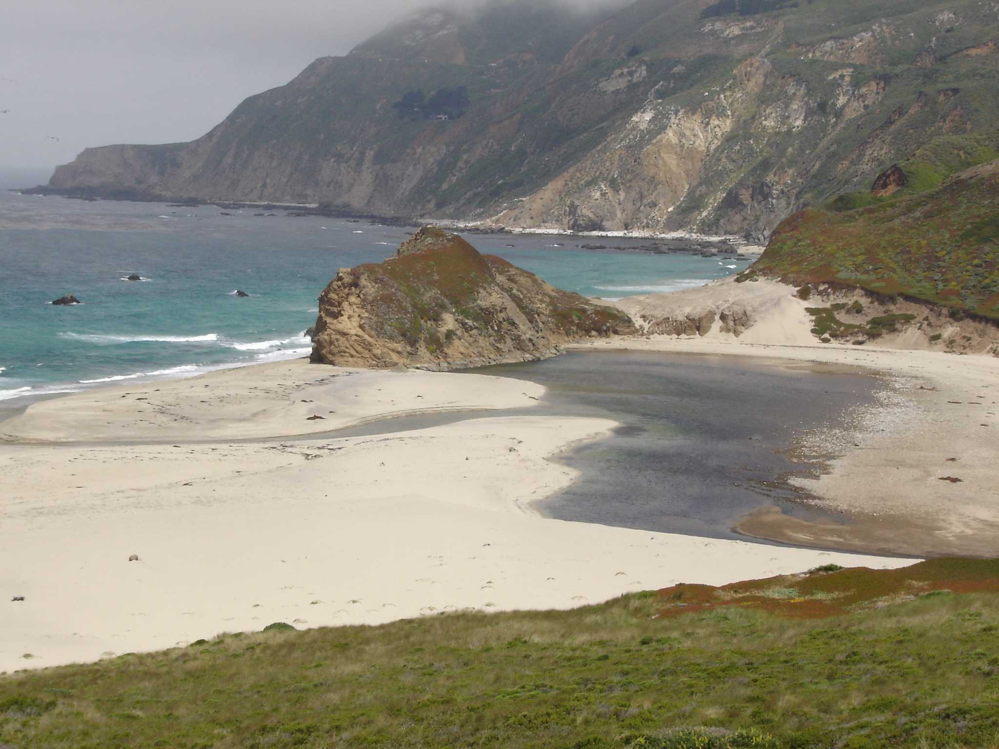 A beach in Andrew Molera State Park — Big Sur.Big Sur